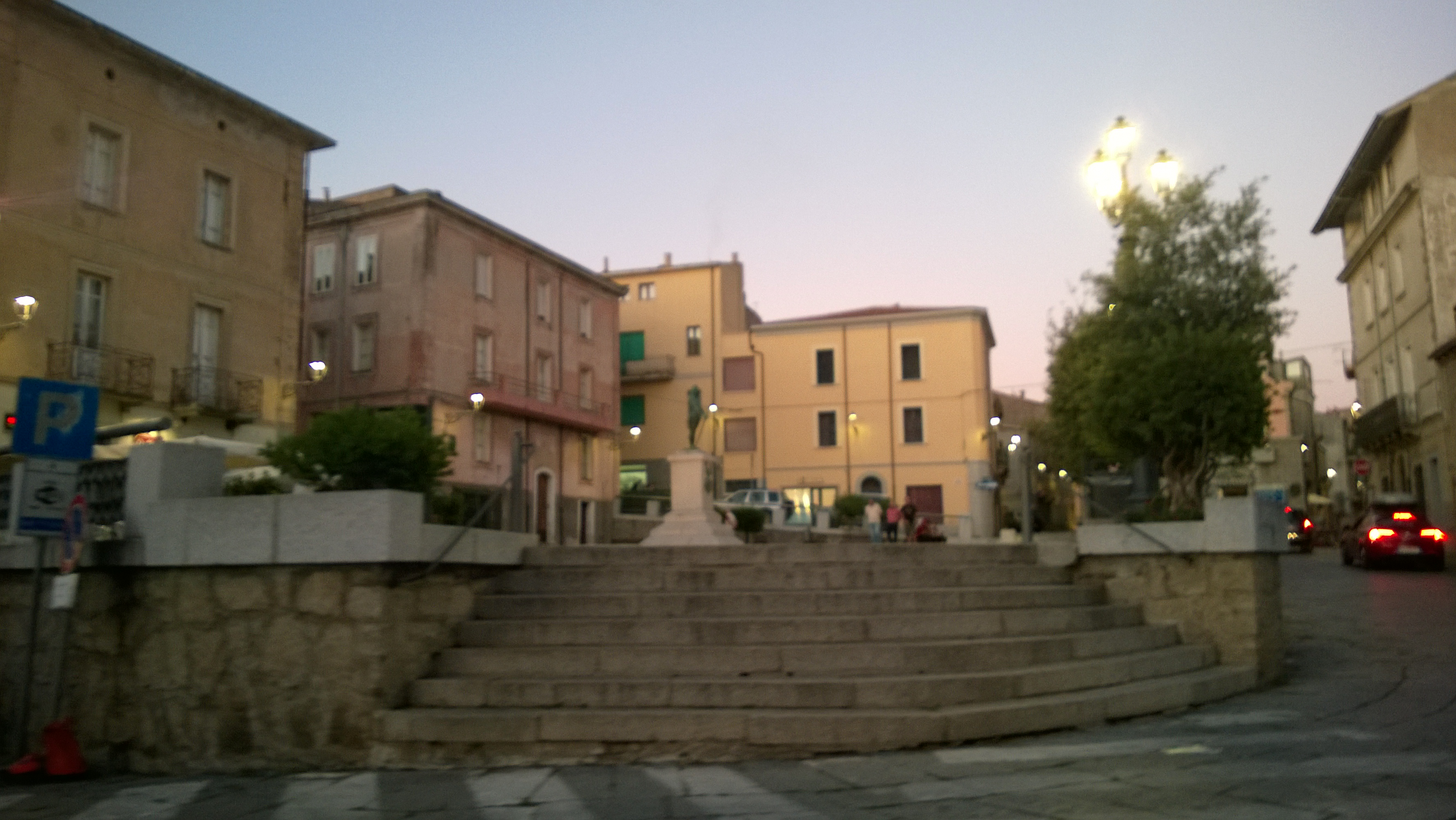 La piazza principale della città gallurese.